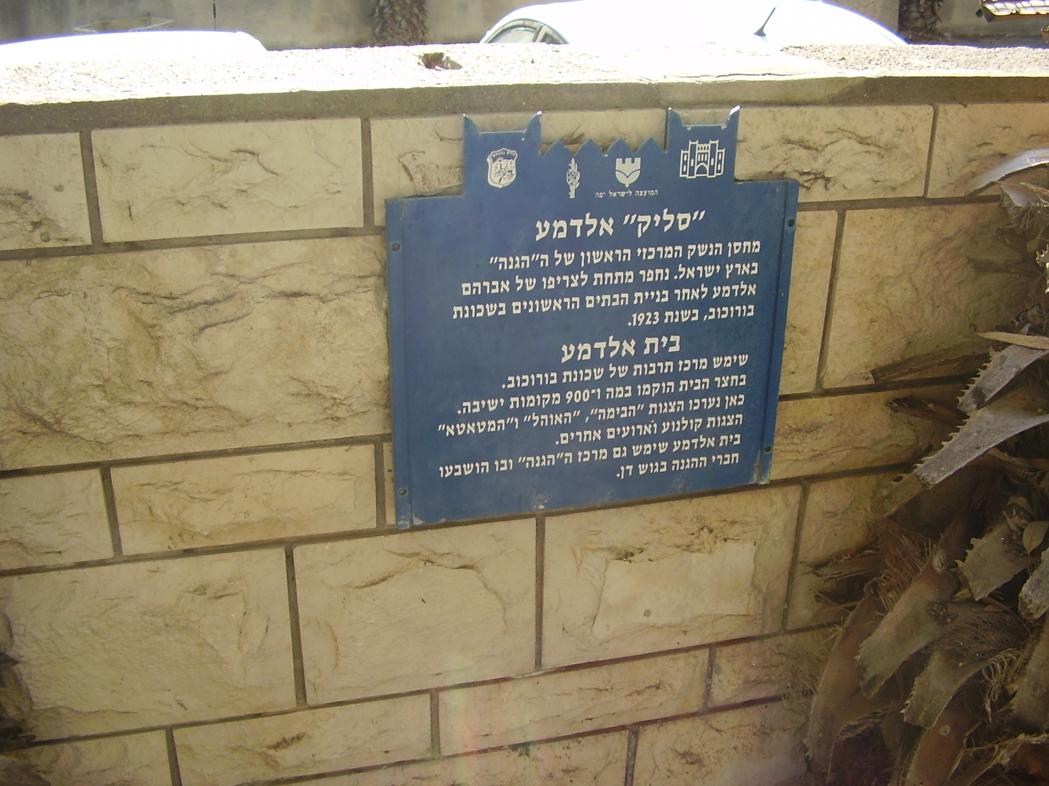 סליק אלדמע בשכונת בורוכוב בגבעתיים